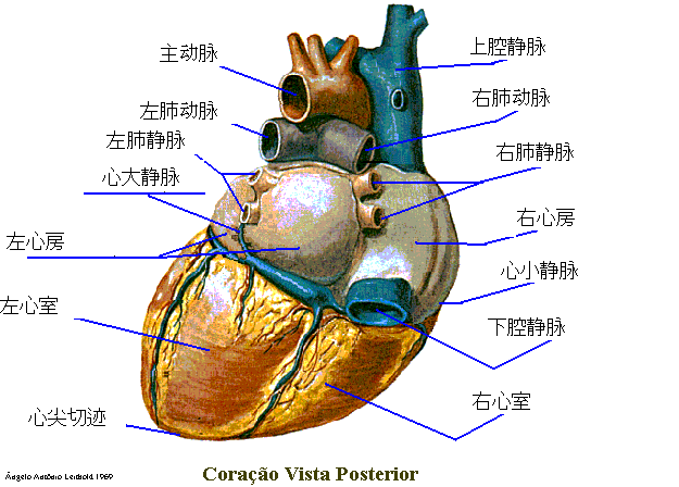 修改The_back_of_heart_chinese1.gif的一处错误 原图来自zh::File:CoraçãoPosteriorPY5aal.gif。